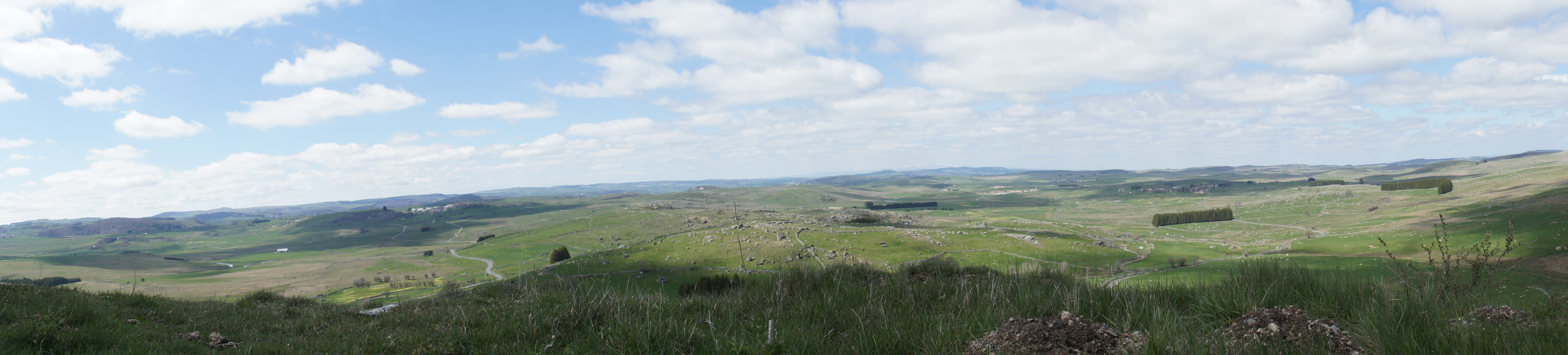 Vue nord depuis le sommet, avec le Plomb du Cantal en fond, Montgros et Notre-Dame de la Sentinelle sur la gauche